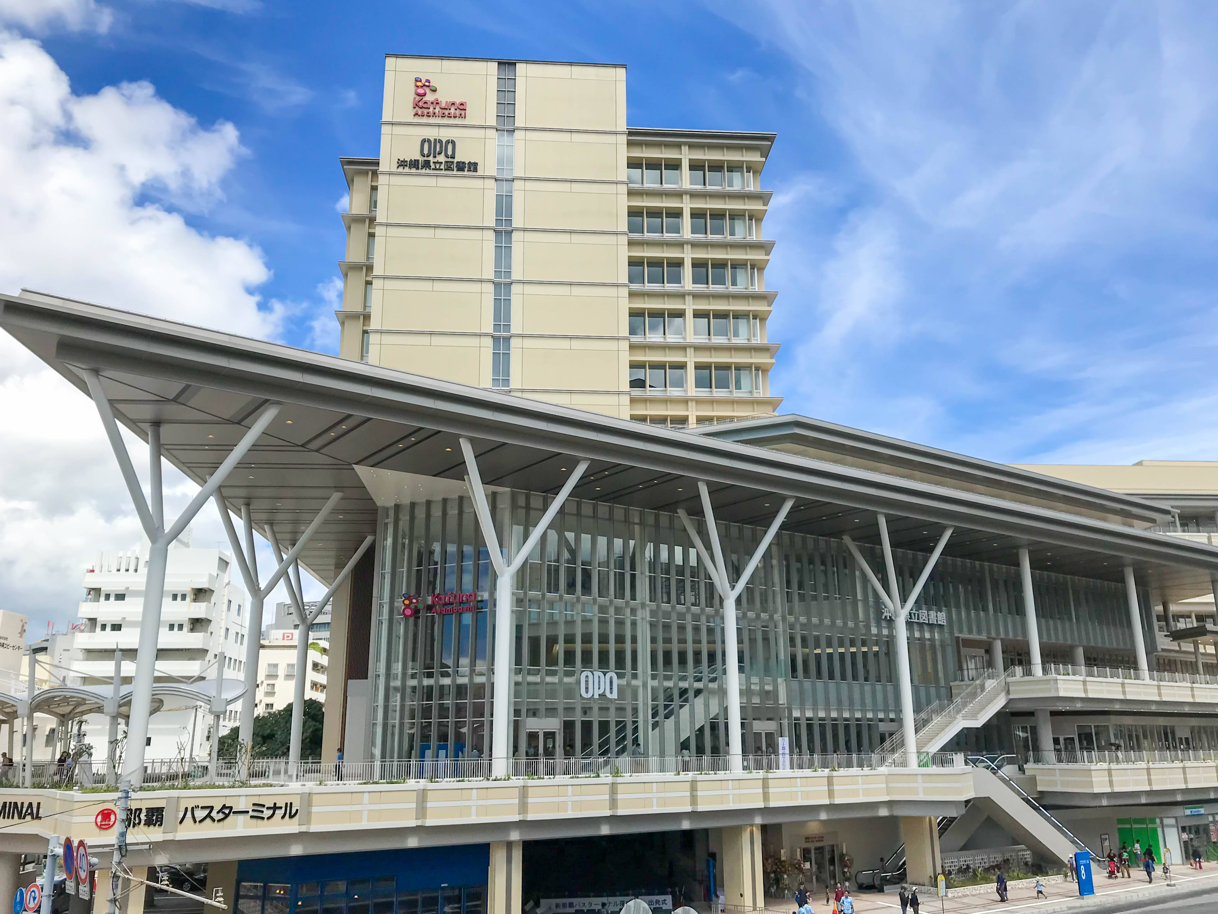 2018年9月に撮影した新しい那覇バスターミナル